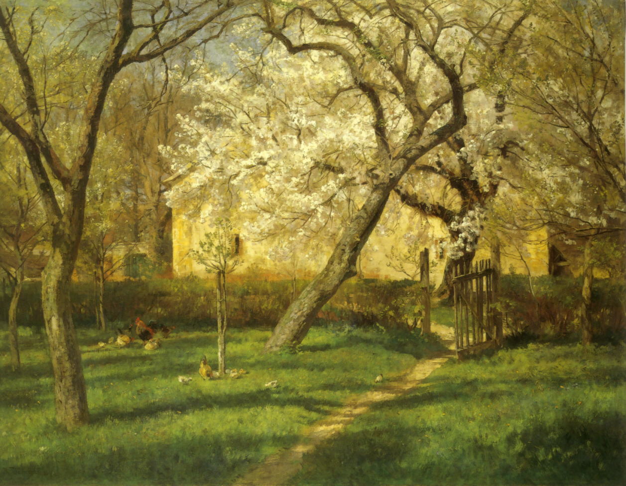 In voller Blüte